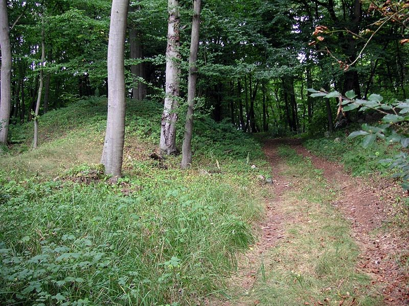 Burgwall Utzedel